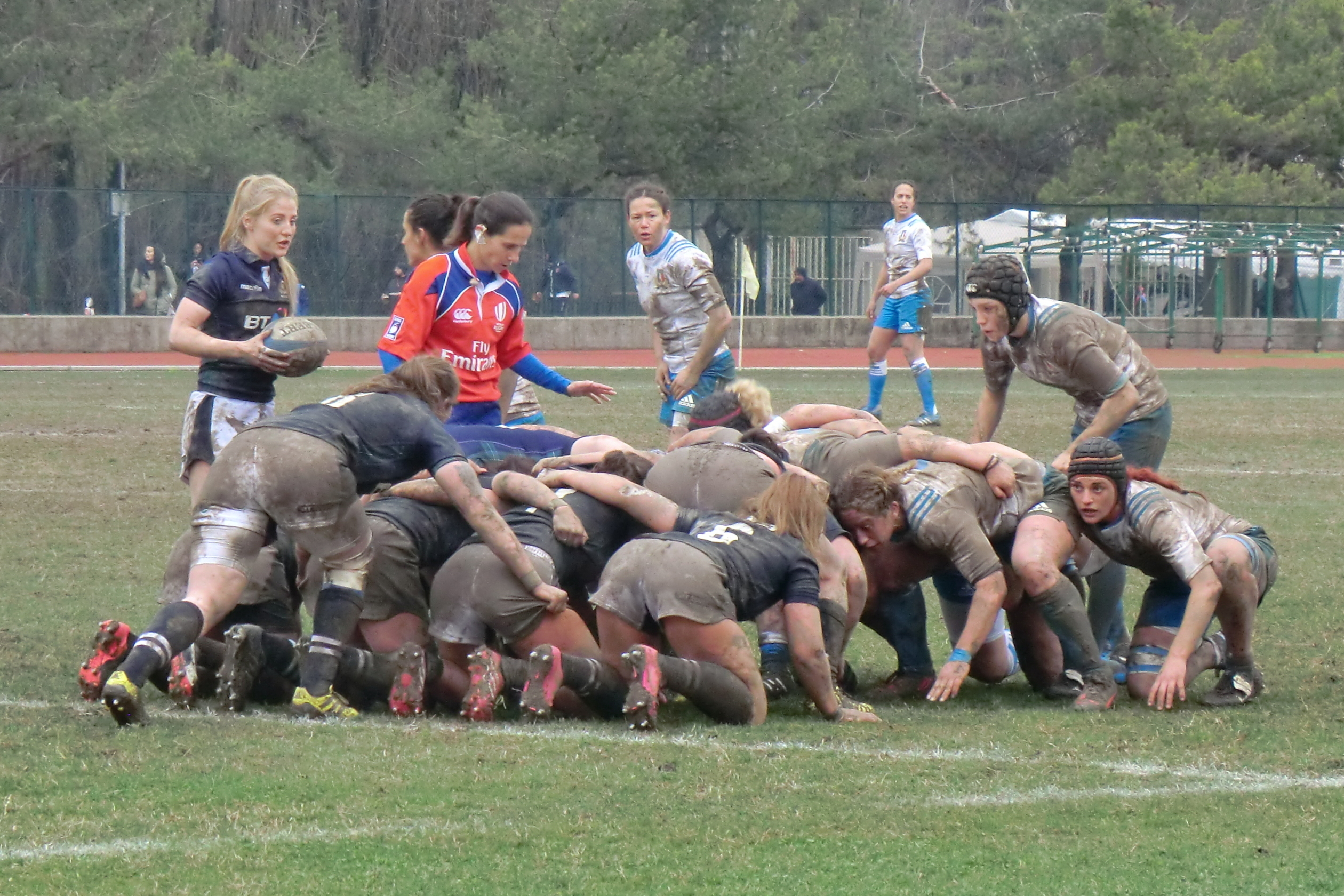 Match Italia-Scozia (22-7) a Bologna, Stadio Bonori dell'Arcoveggio, 28 febbraio 2016. L'Italia si qualifica per i Mondiali 2017.